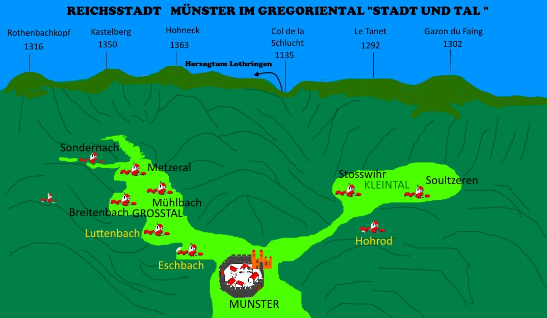 Ville impériale libre Munster Val de Saint-Grégoire